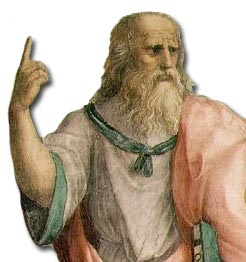 Platón en su alusión al Mundo de las ideas. El rostro esta hecho a semejanza